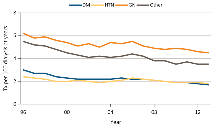 DM : Diabète. HTN : Hypertension Artérielle. GN : Glomérulonéphrite. Other : Autre